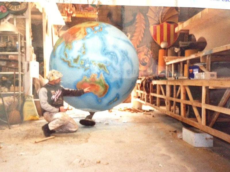 Inicios 1